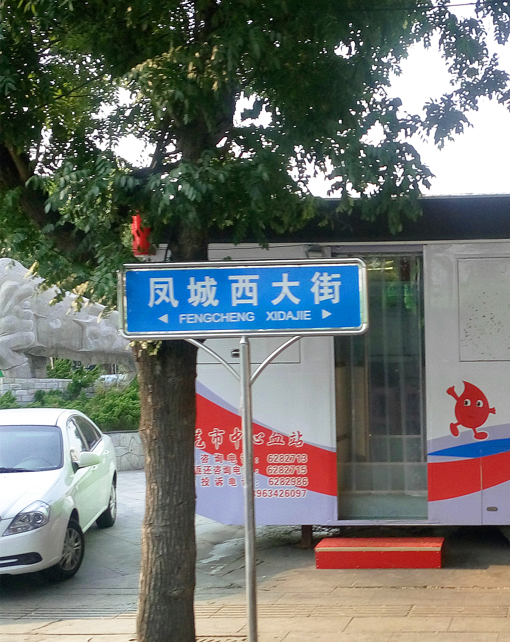 莱芜凤城西大街